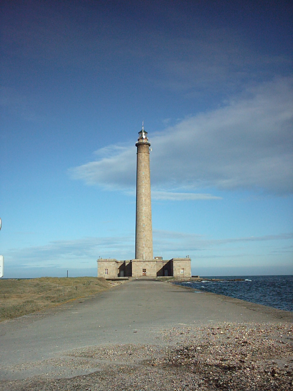 Lieu : Cotentin (Normandie/France) Phare de Gattevile